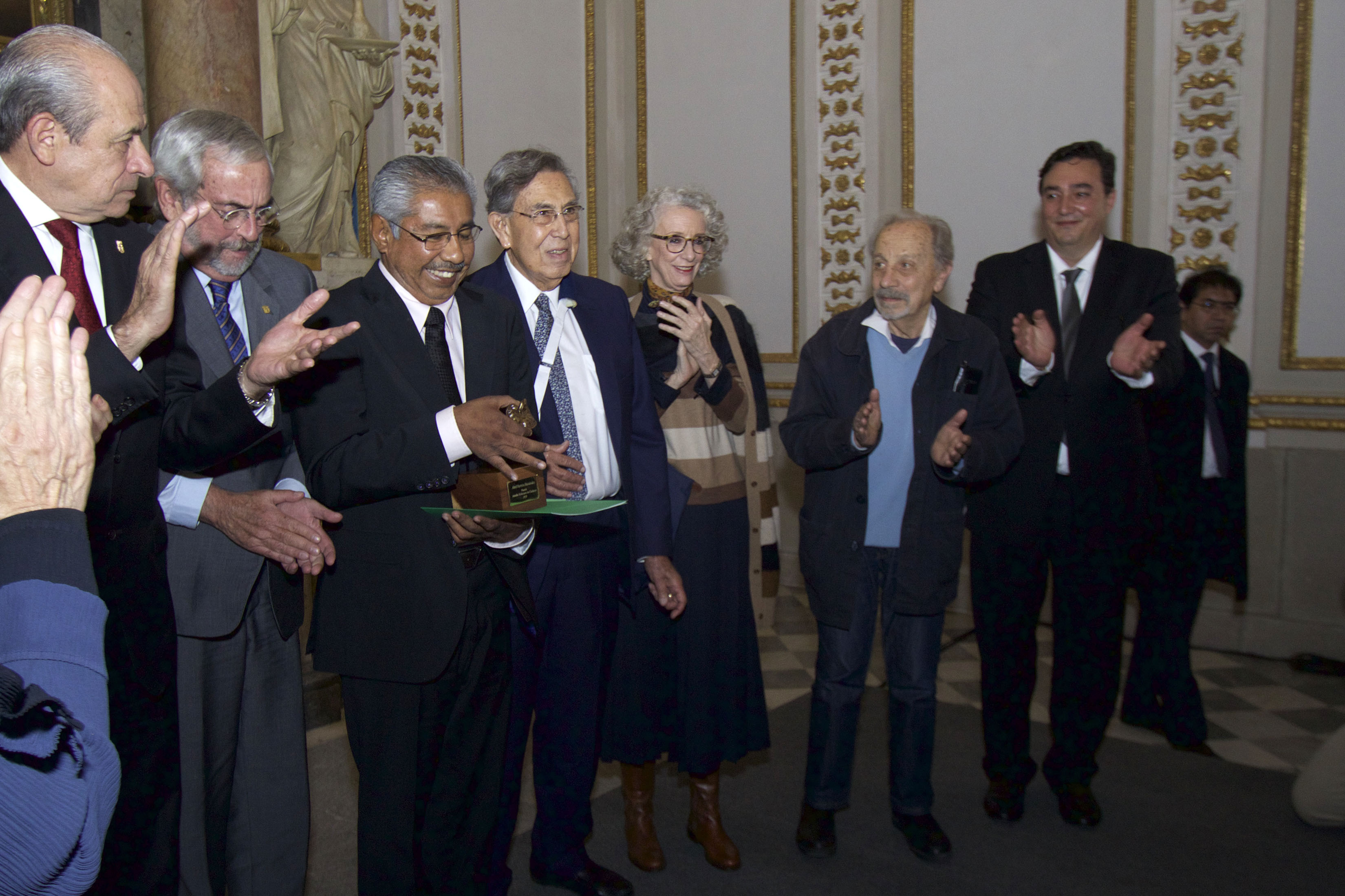 Jueves 12 de octubre de 2017. En el Palacio de Minería, se hizo entrega del Premio Amalia Solórzano de Cárdenas 2017, al antropólogo Abel Barrera Hernández, fundador del Centro de Derechos Humanos de la Montaña de Tlachinollan, Guerrero. En la entrega participó el ingeniero Cuauhtémoc Cárdenas Solórzano, Cuauhtémoc Cárdenas Batel, Adolfo Gilly, como parte del Consejo del premio. Al acto acudió como invitado Eduardo Vázquez Martín, secretario de Cultura de la CDMX Fotografía: Milton Martínez / Secretaría de Cultura CDMX. Jueves 12 de octubre de 2017. En el Palacio de Minería, se hizo entrega del Premio Amalia Solórzano de Cárdenas 2017, al antropólogo Abel Barrera Hernández, fundador del Centro de Derechos Humanos de la Montaña de Tlachinollan, Guerrero. En la entrega participó el ingeniero Cuauhtémoc Cárdenas Solórzano, Cuauhtémoc Cárdenas Batel, Adolfo Gilly, como parte del Consejo del premio. Al acto acudió como invitado Eduardo Vázquez Martín, secretario de Cultura de la CDMX Fotografía: Milton Martínez / Secretaría de Cultura CDMX.